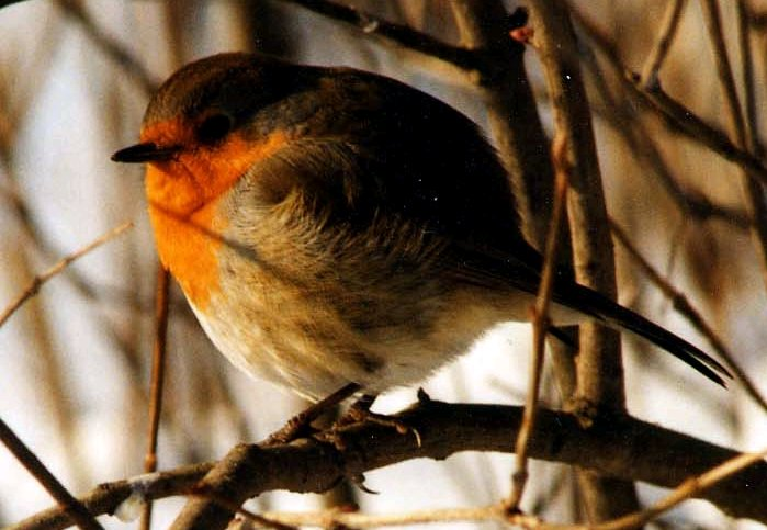 Rotkehlchen, größeres Bild Copyright: "for unlimited free use", d. h. gemeinfrei